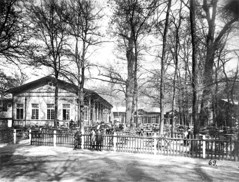 Leipzig, Vor dem Rosentaltor: Gaststätte und Café „Schweizerhäuschen“, um 1885.